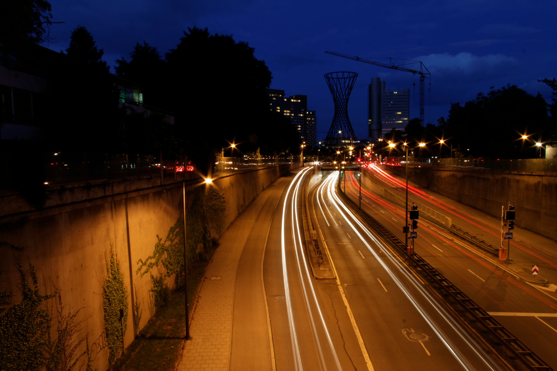 München, Effnerplatz mit Mae West und Einfahrt in den Effnertunnel